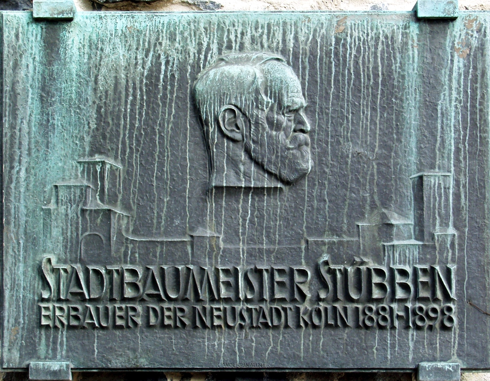 Gedenktafel zu Ehren von Stadtbaumeister Josef Stübben